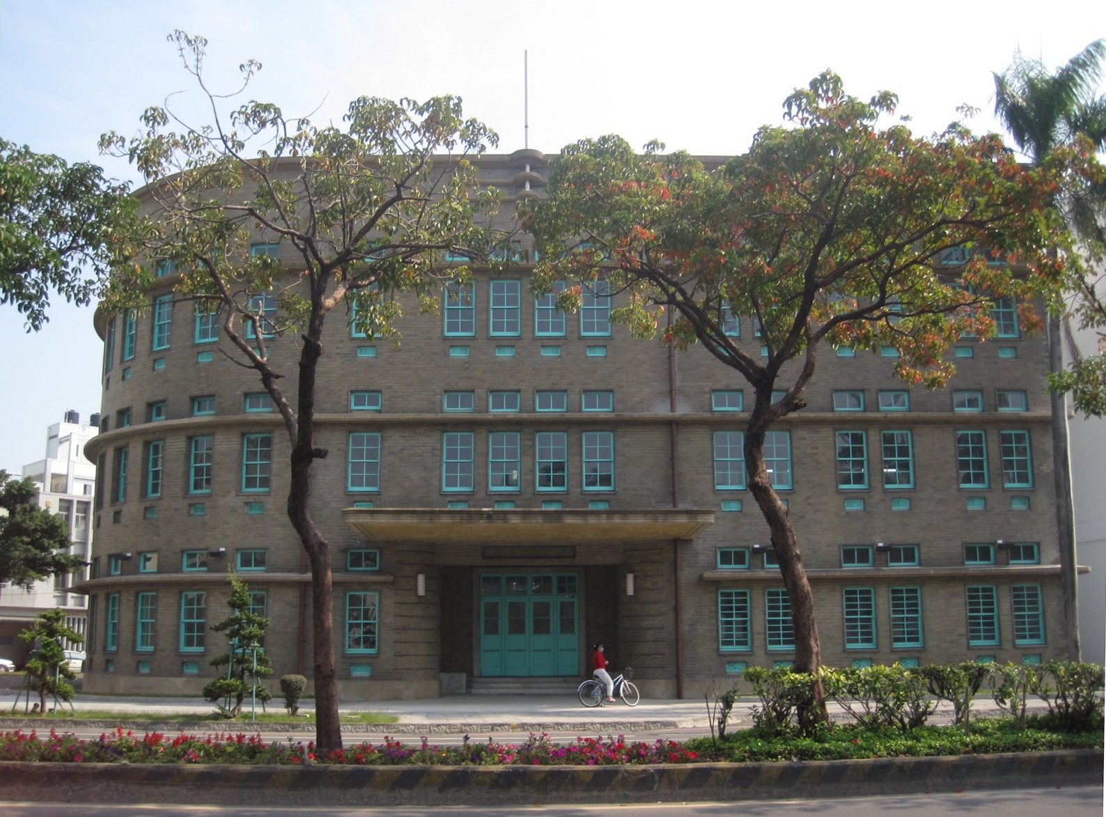 菸酒公賣局嘉義分局，日本時代的臺灣總督府專賣局嘉義支局